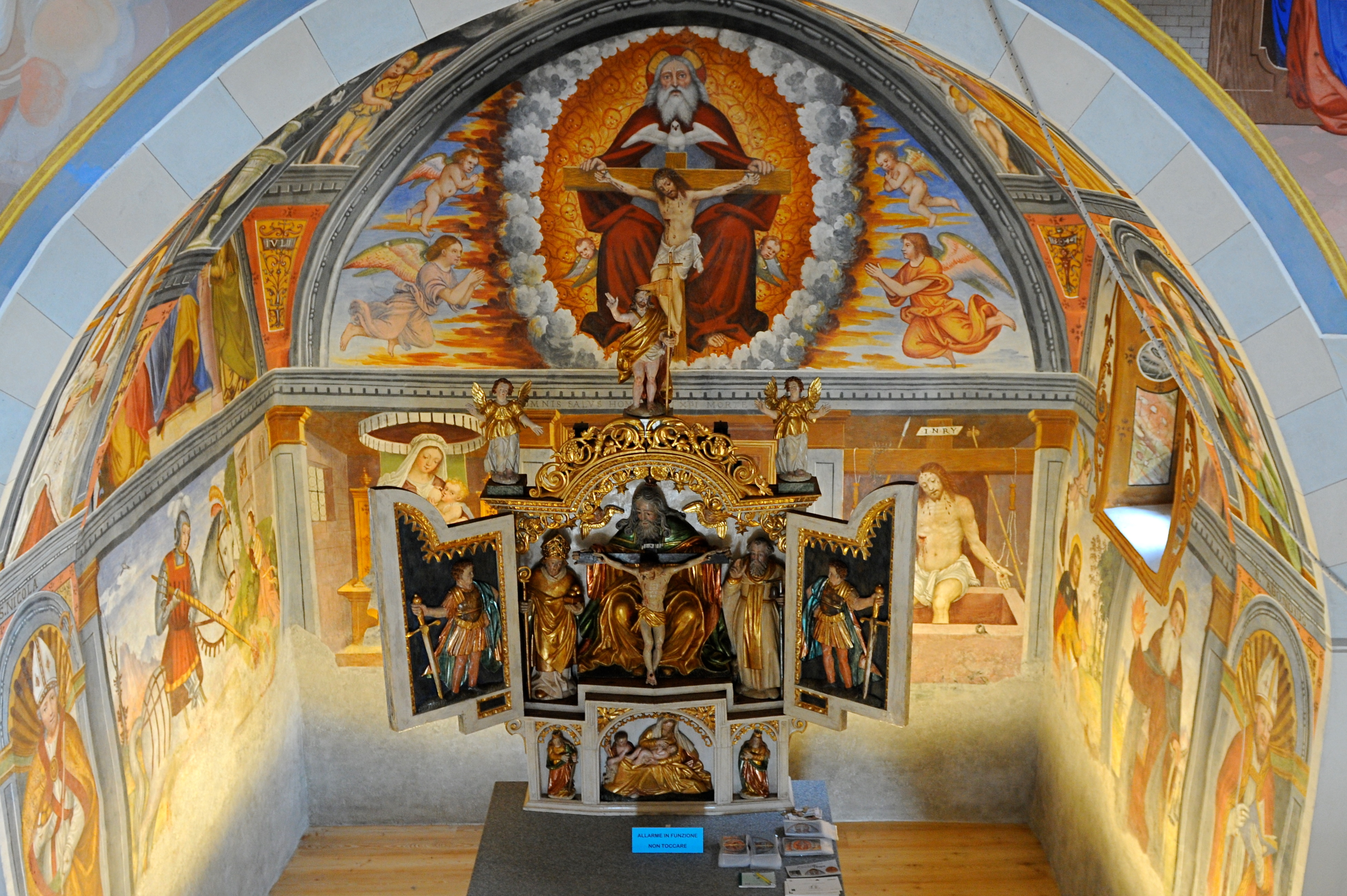 Chiesa della SS. Trinità